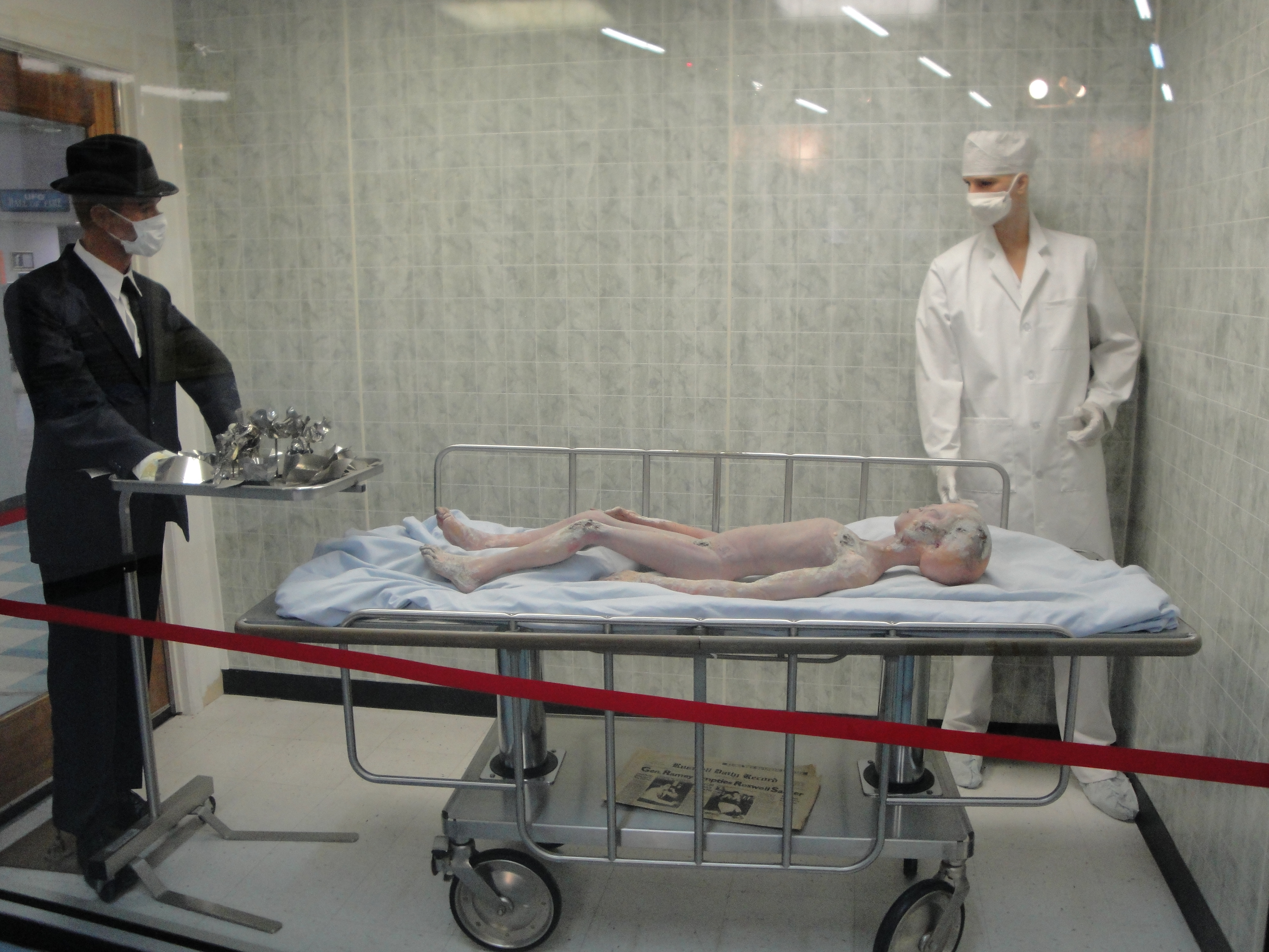 Alien Autopsy - 21